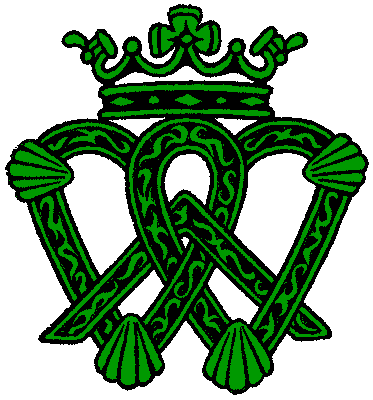 L'une des version du motif Luckenbooth: deux cœurs entrecroisés surmontés d'une courone.